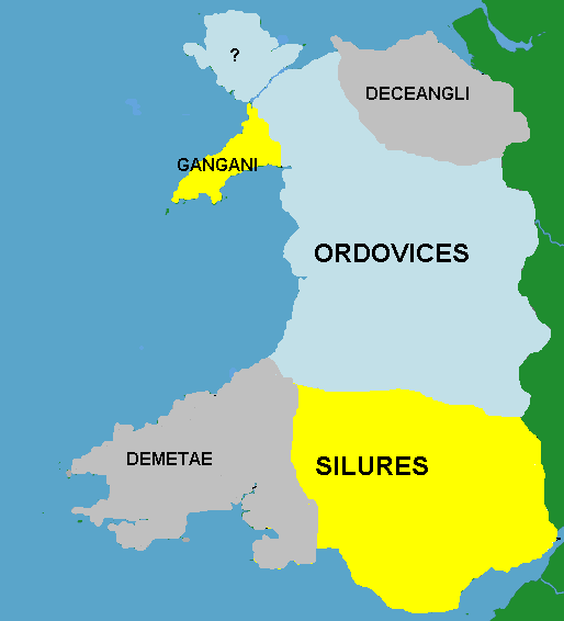 Llwythi Cymru yng nghyfnod y Rhufeiniaid Tribes of Wales in the Roman period Rhion Pritchard